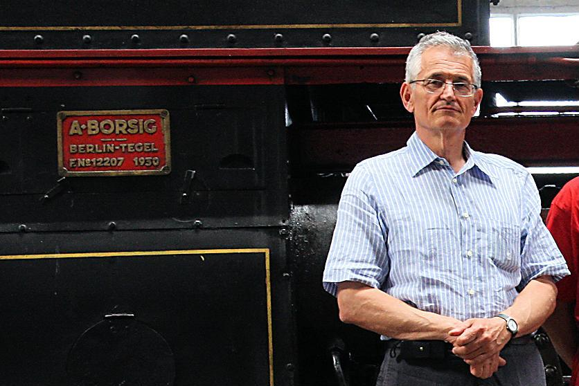 Prof. Mladen Bogić